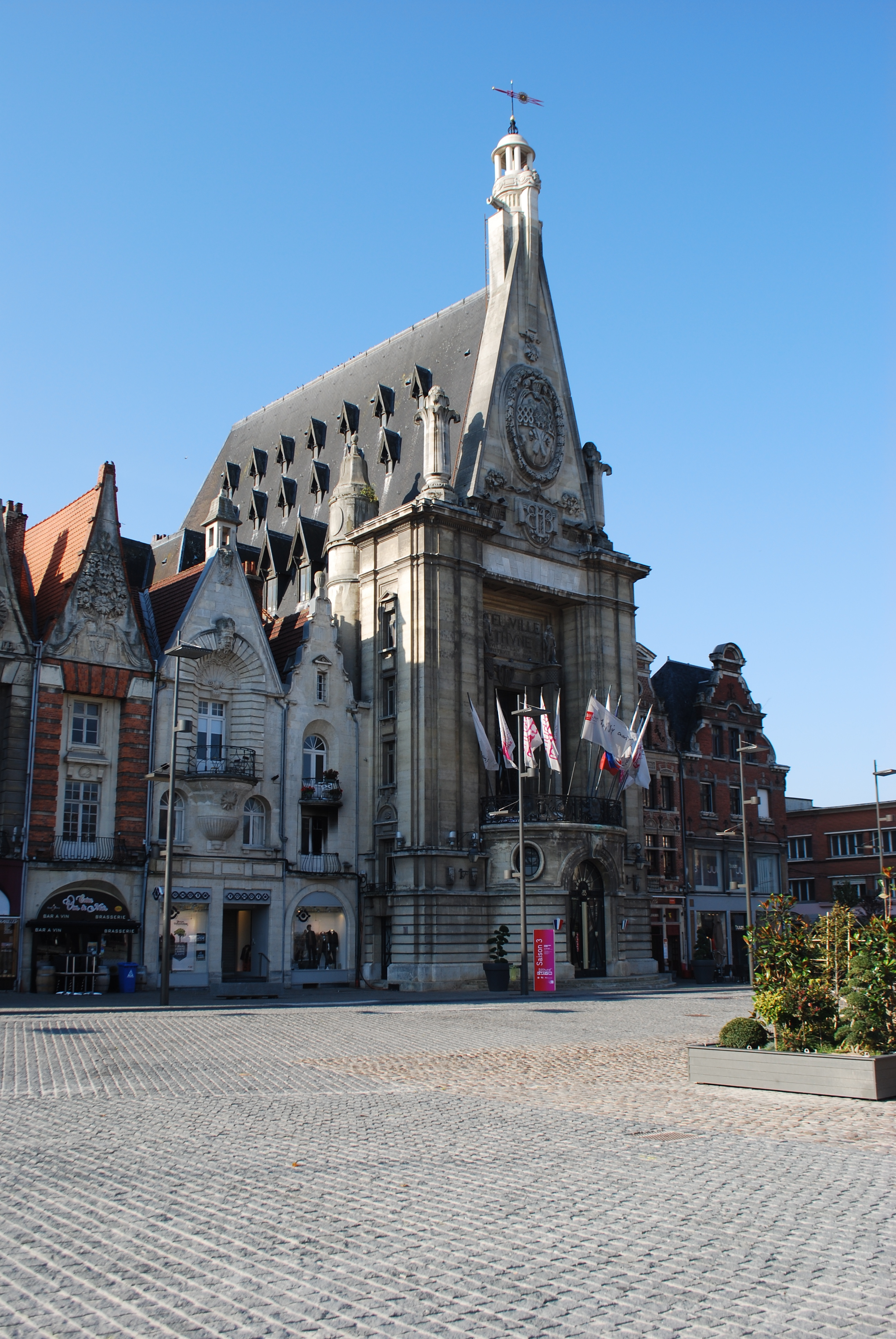 Vue de la Grand Place de Béthune.